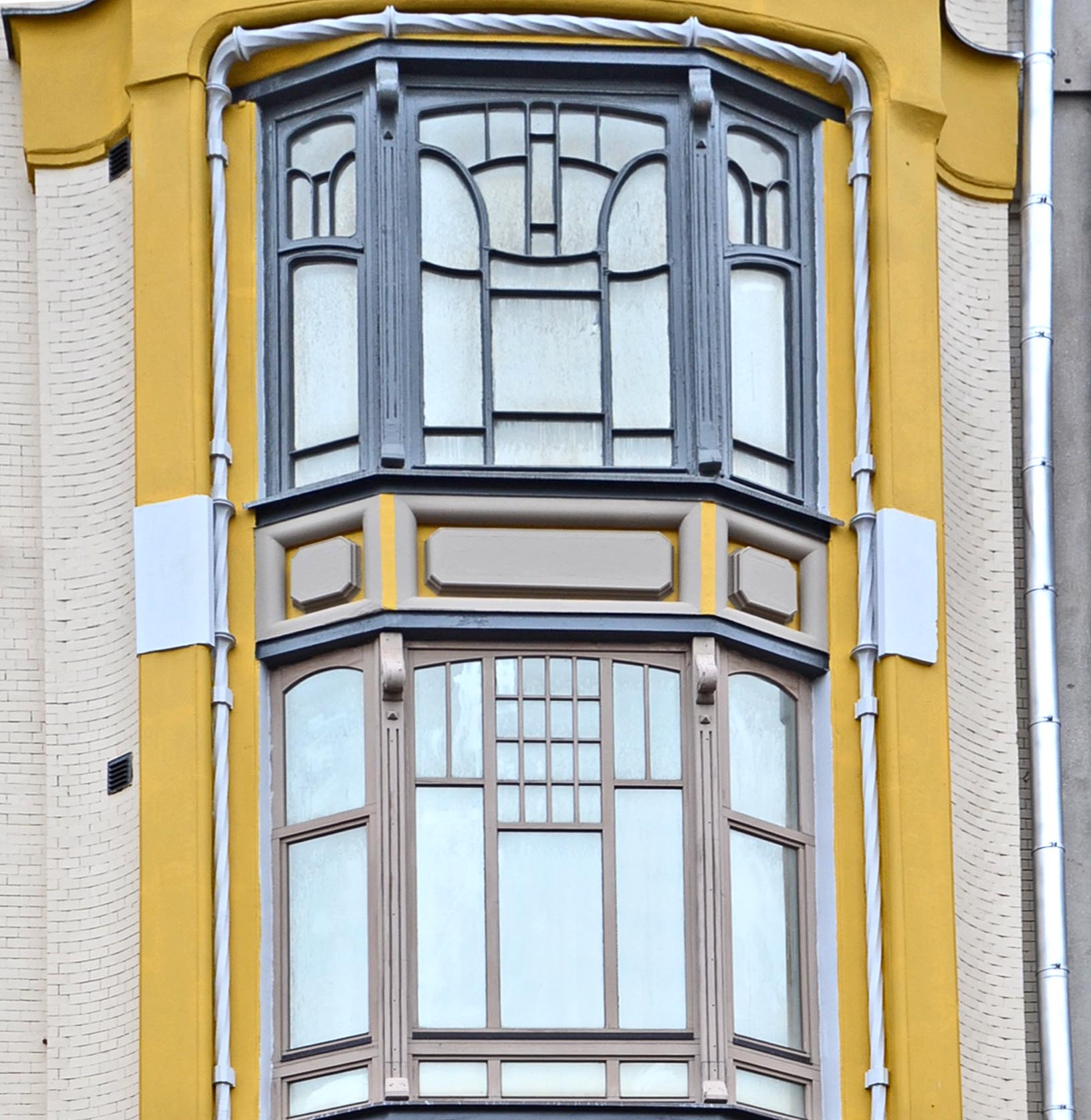 Доходный дом Исакова, деталь фасада